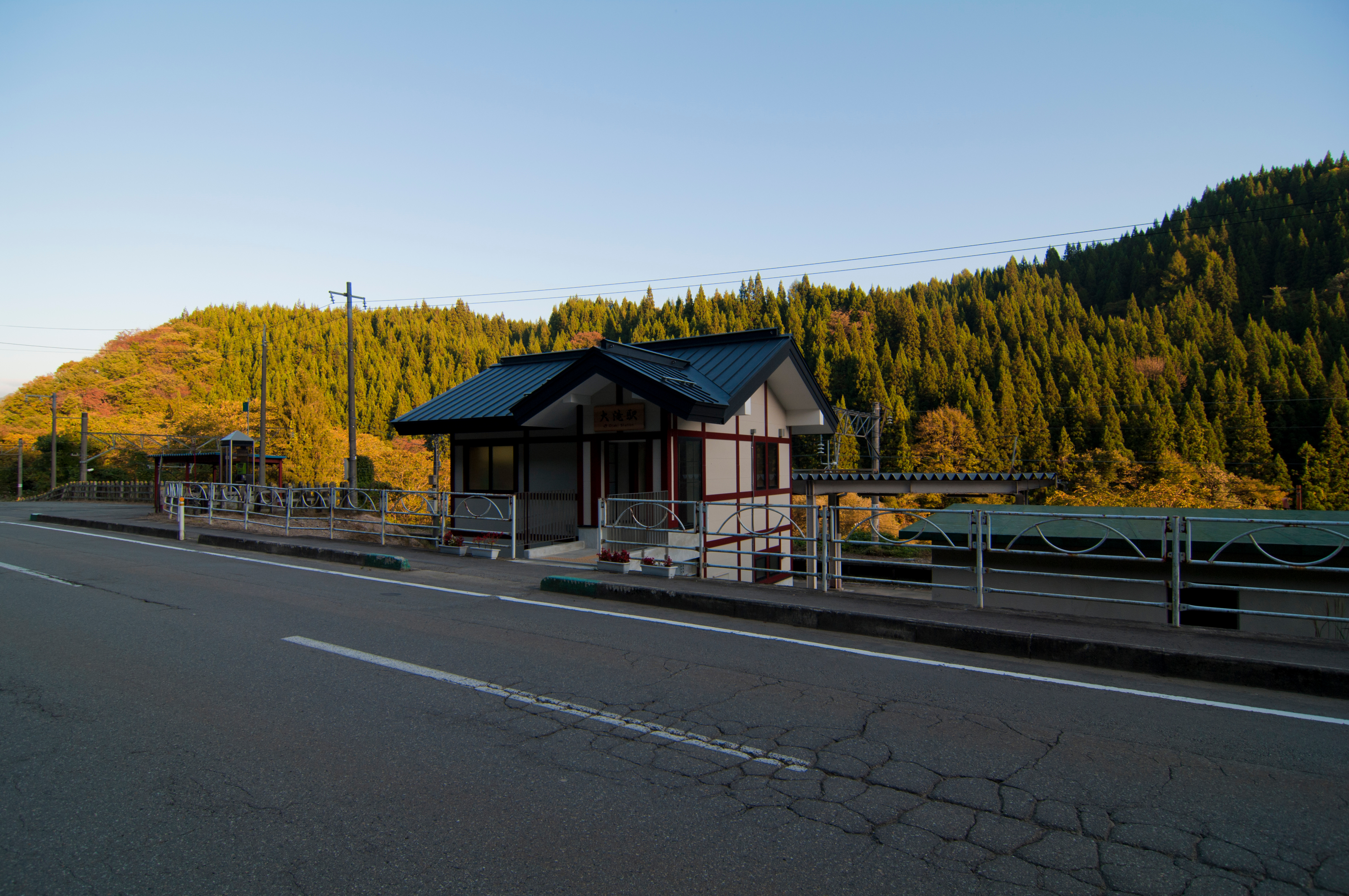 東日本旅客鉄道奥羽本線線大滝駅